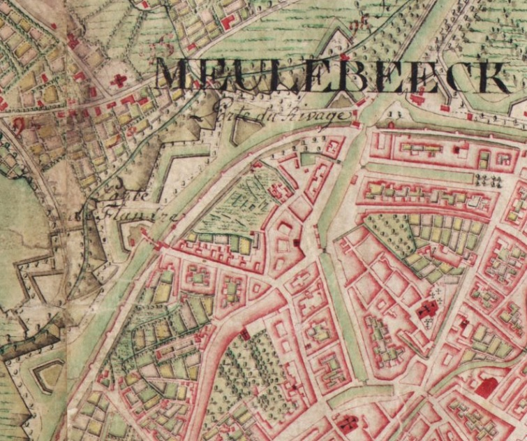 Extrait de la carte de Ferraris n° 76